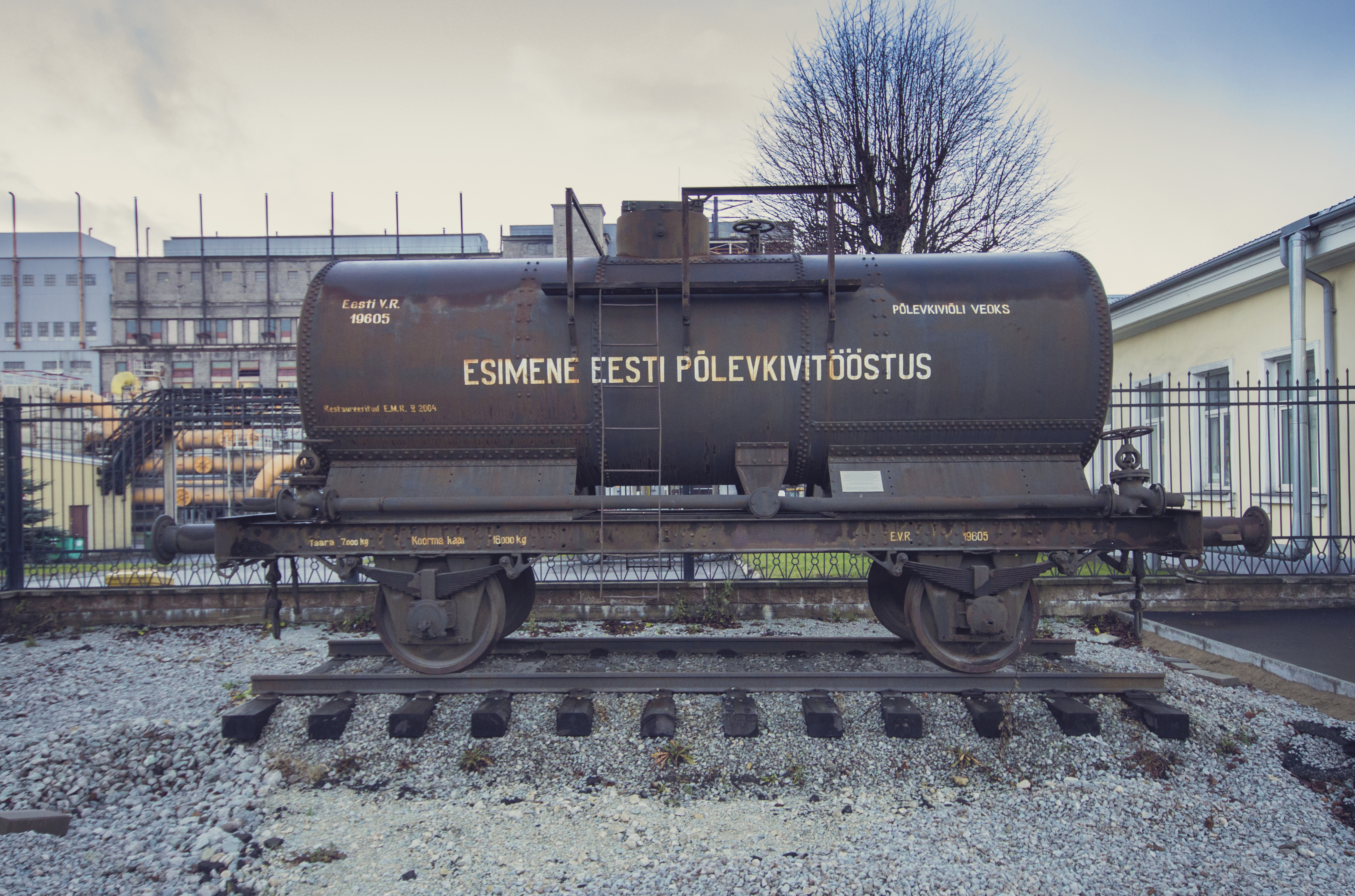 Monument esimesele Eesti põlevkivitööstusele.